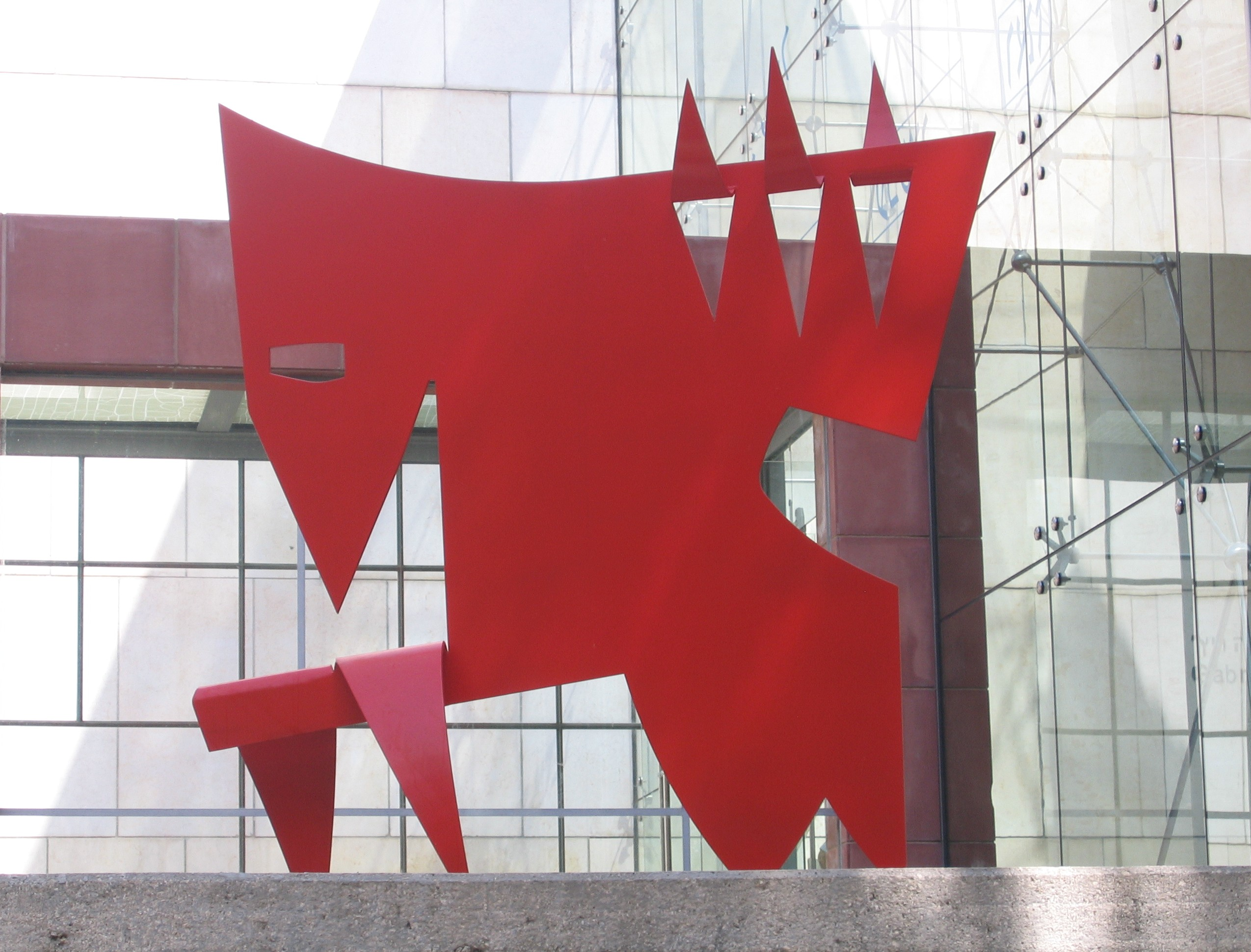 Sculpture